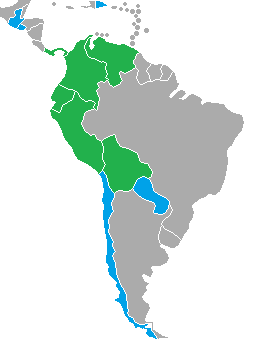 Paises participantes de los Juegos Bolivarianos Países miembros de ODEBO Países invitados